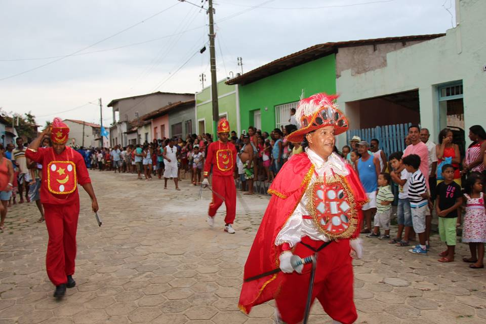 bsbshjbd